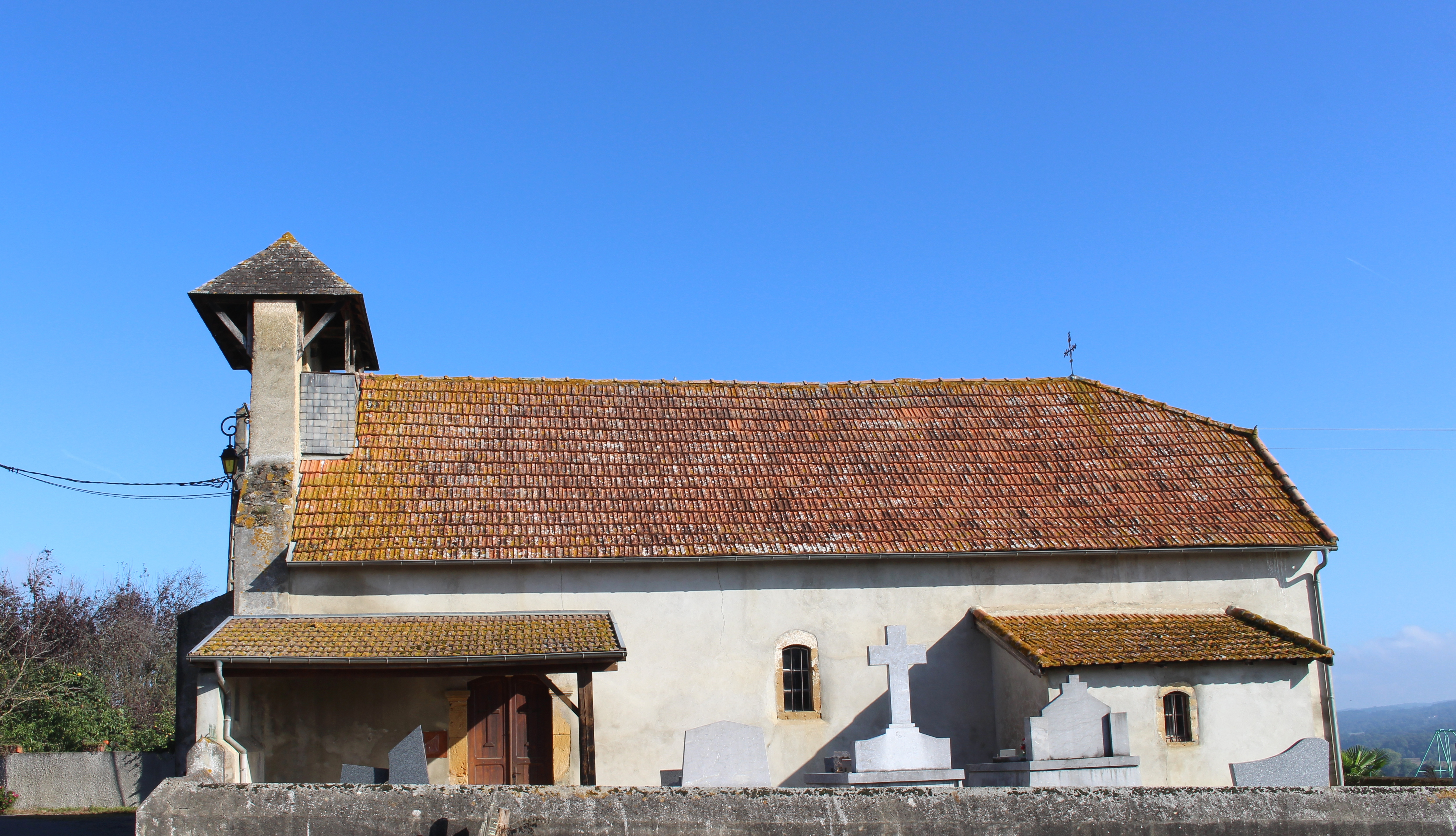 Église Saint-Pierre de Gonez (Hautes-Pyrénées)